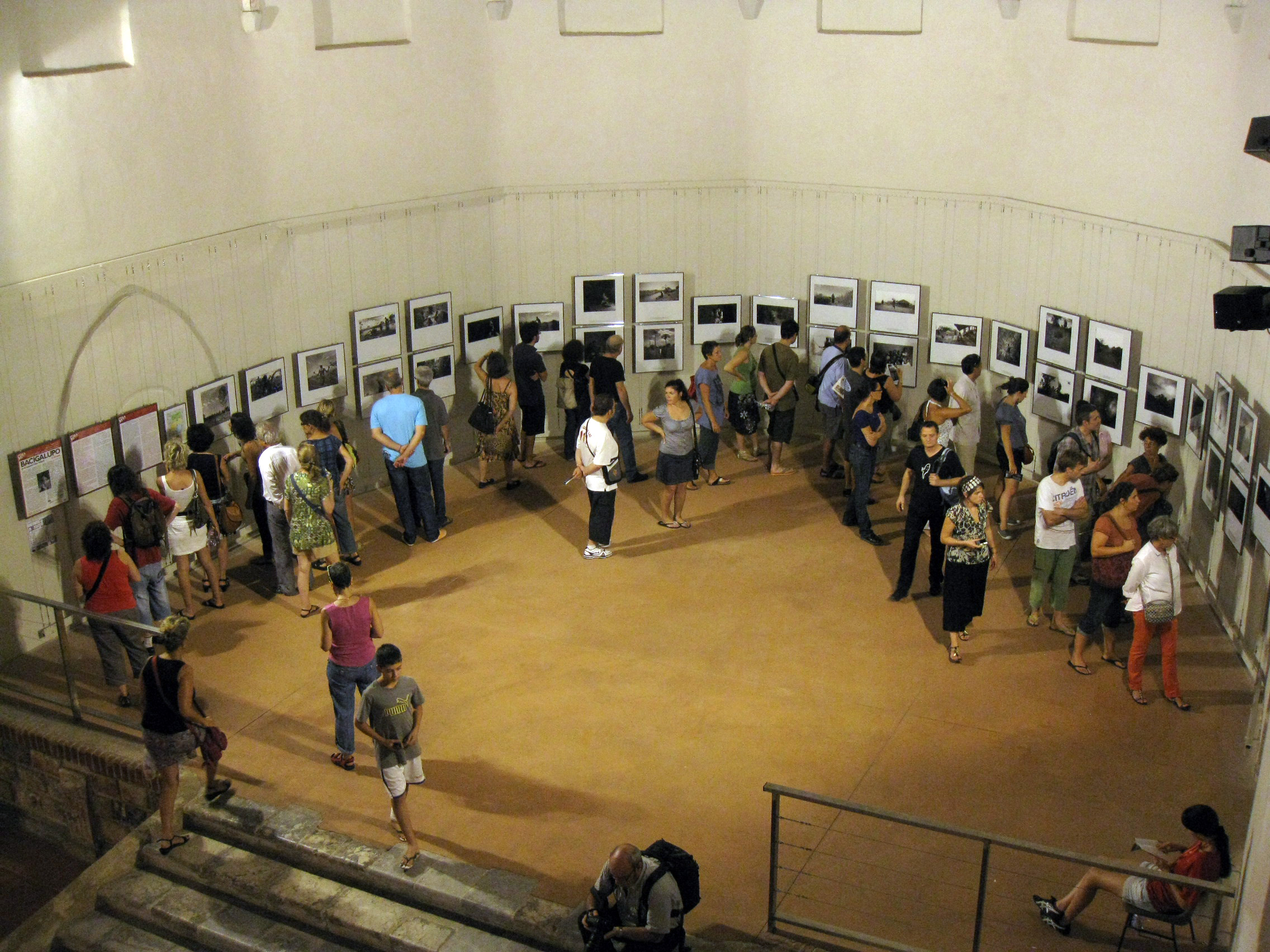 Convent dels Mínims (Perpinyà), el presbiteri de l'antiga església durant la celebració del certamen de fotoperiodisme Visa pour l'Image .